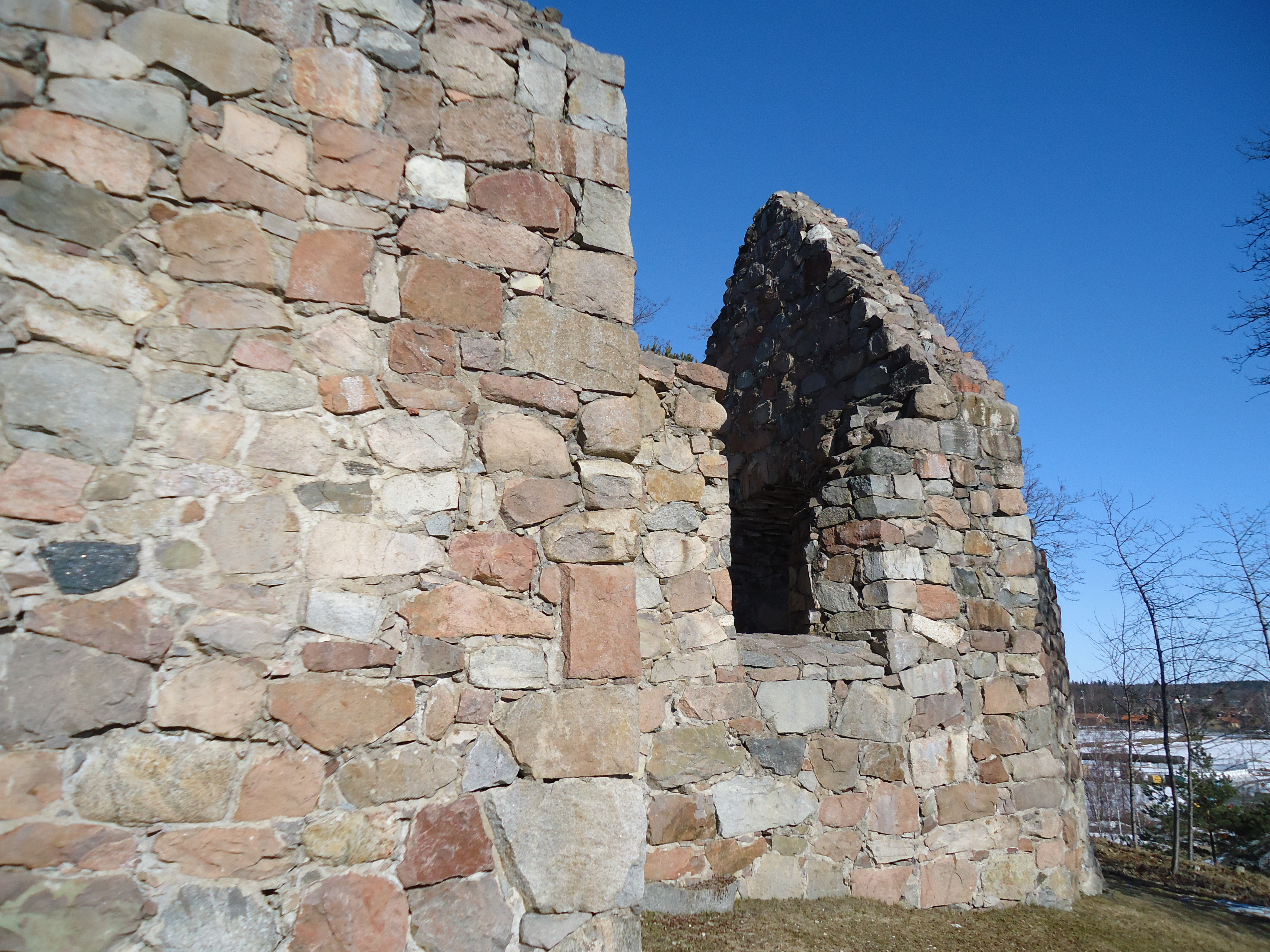 Kärnbo ödekyrka, Mariefred, Sverige